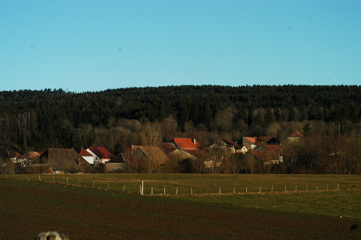 Commune Le LATET, 39300, Jura, Franche Comté